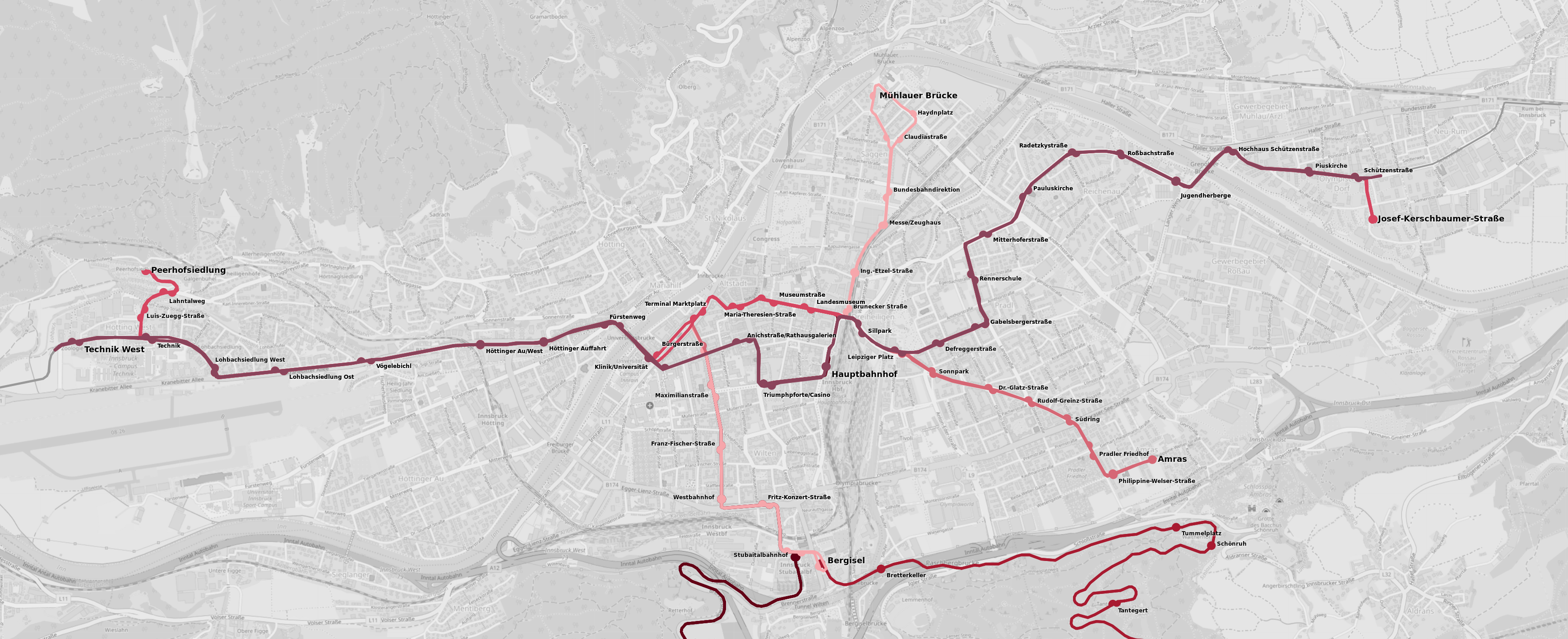 Netzplan Straßenbahn Innsbruck ab Fahrplanwechsel 2019-01-26 This map may be incomplete, and may contain errors. Don't rely solely on it for navigation.